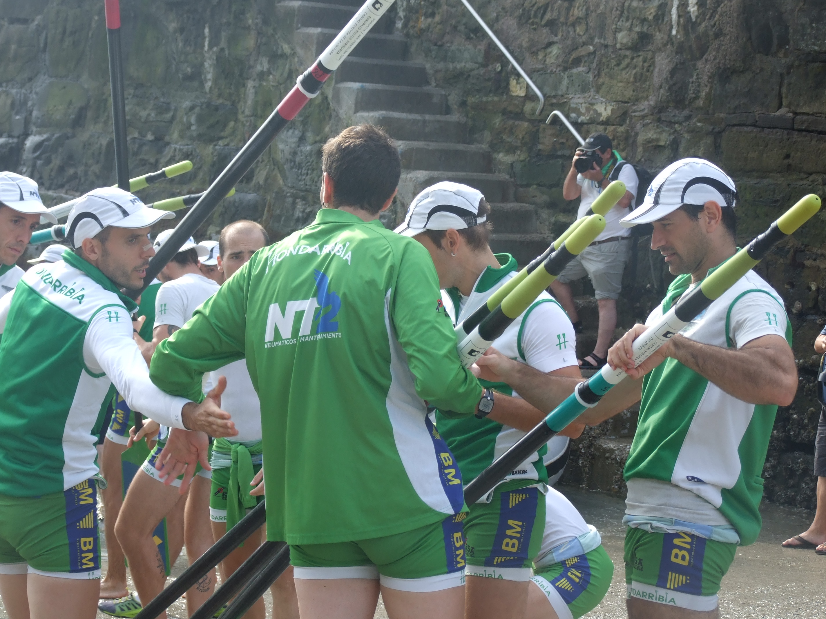 Bandera de la Concha 2016